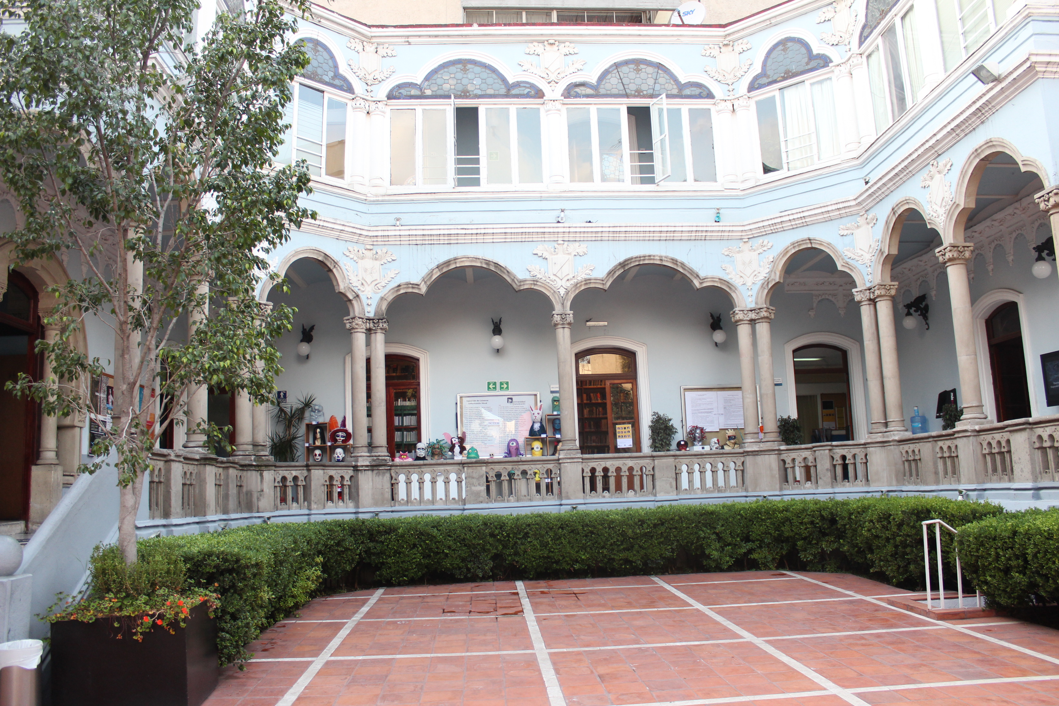 Interior de la Universidad de la Comunicación, ubicada en la Colonia Roma, Zacatecas 120